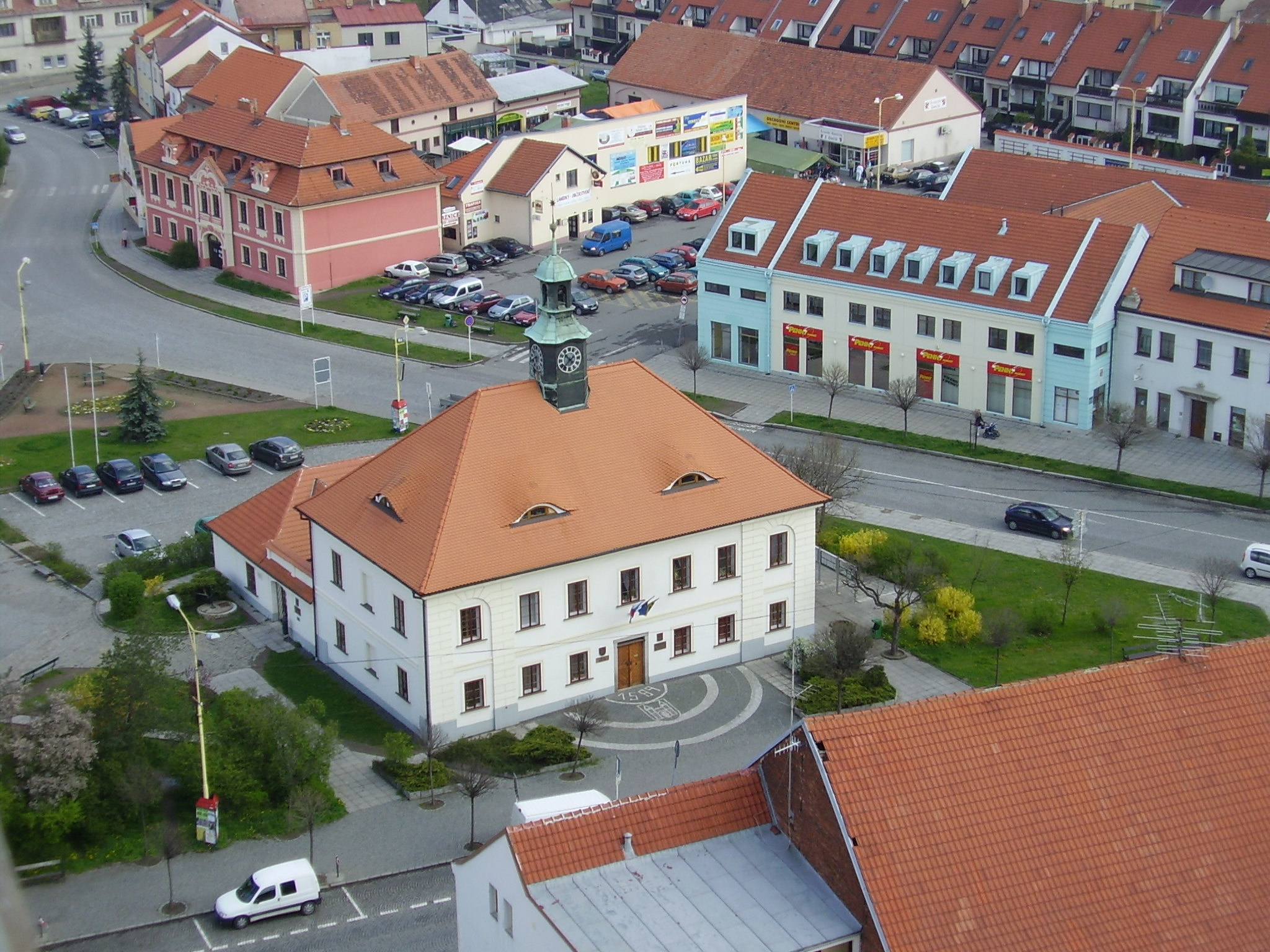 Městský úřad